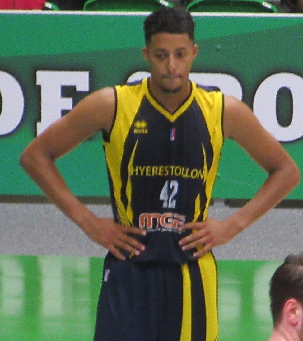 William Howard basket-ball